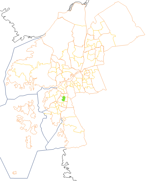 Karta som visar primärområdes belägenhet i Göteborg